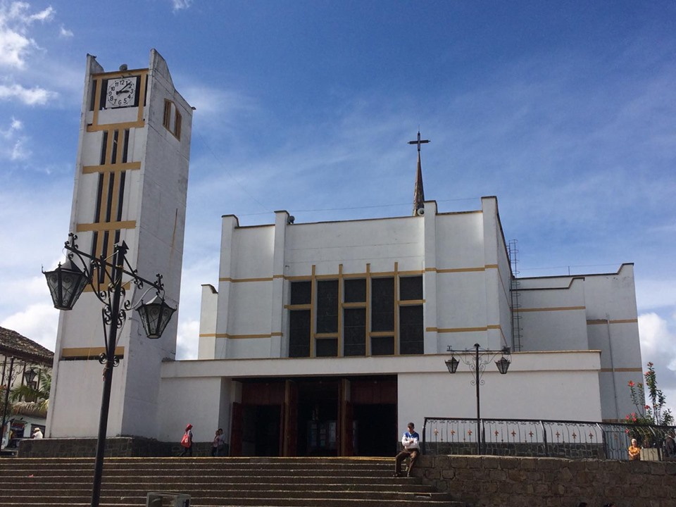 Aspecto del frontis de la Catedral de Sonsón.